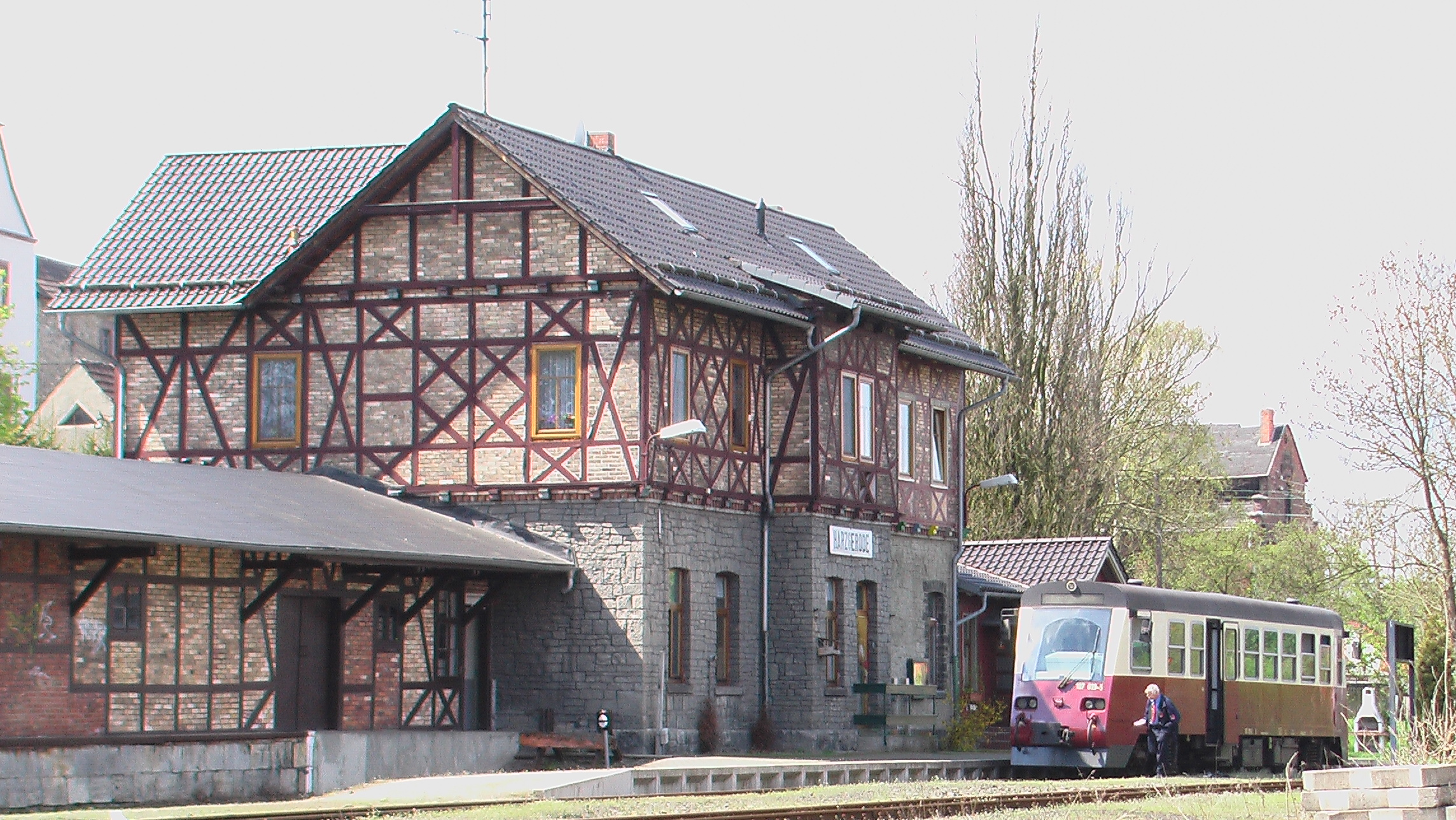 Het station van Harzgerode in Duitsland.